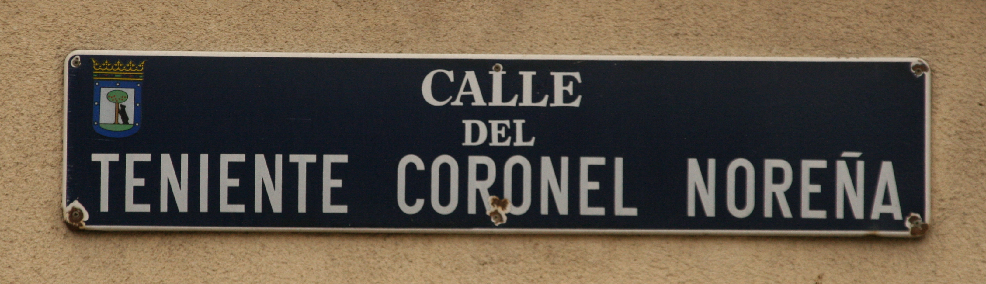 Placa de la calle Teniente Coronel Noreña, esquina con la calle Ricardo Goizueta, en el madrileño distrito de Arganzuela, barrio de Legazpi